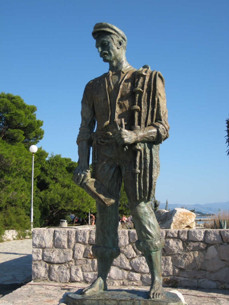 Ribar Zvonka Cara, Crikvenica, Croatia